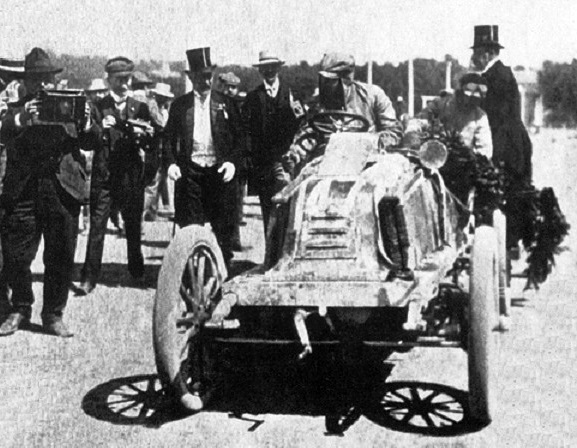 Marcel Renault après la dernière étape de Paris-Vienne 1902